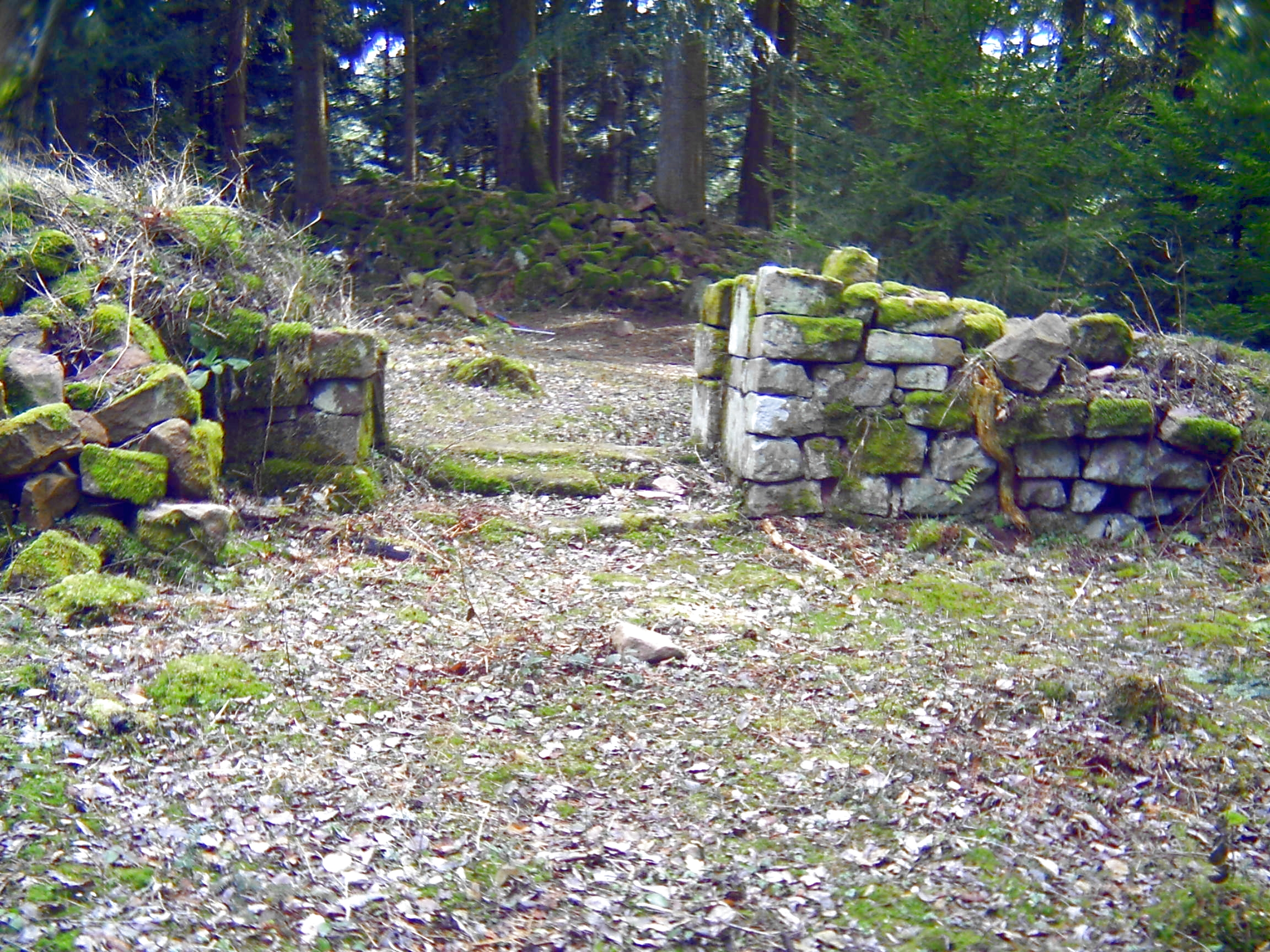 gemauerte Türöffnung innerhalb der Willenburg, Schiltach